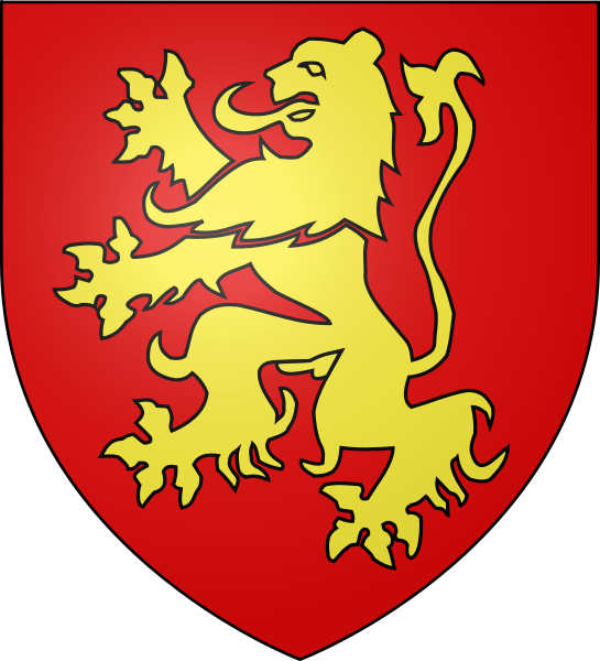 Blason de Jean Ier de Montmirail tel que décrit sur son monument funéraire en l'Abbaye de Longpont Réemploi de Blason_province_fr_Soule.svg